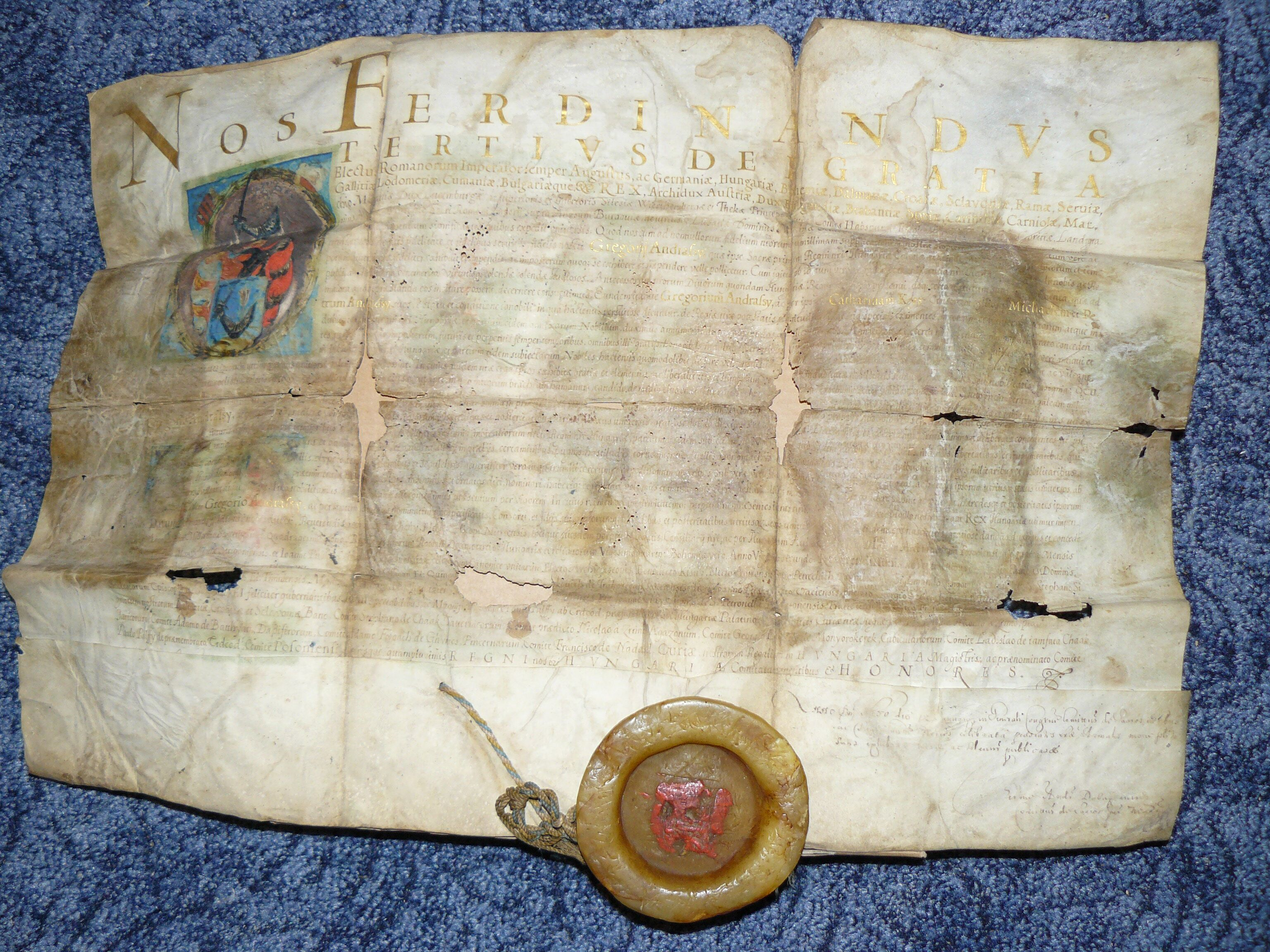 A nemes Andrássy család címeres nemeslevele 1649-ből